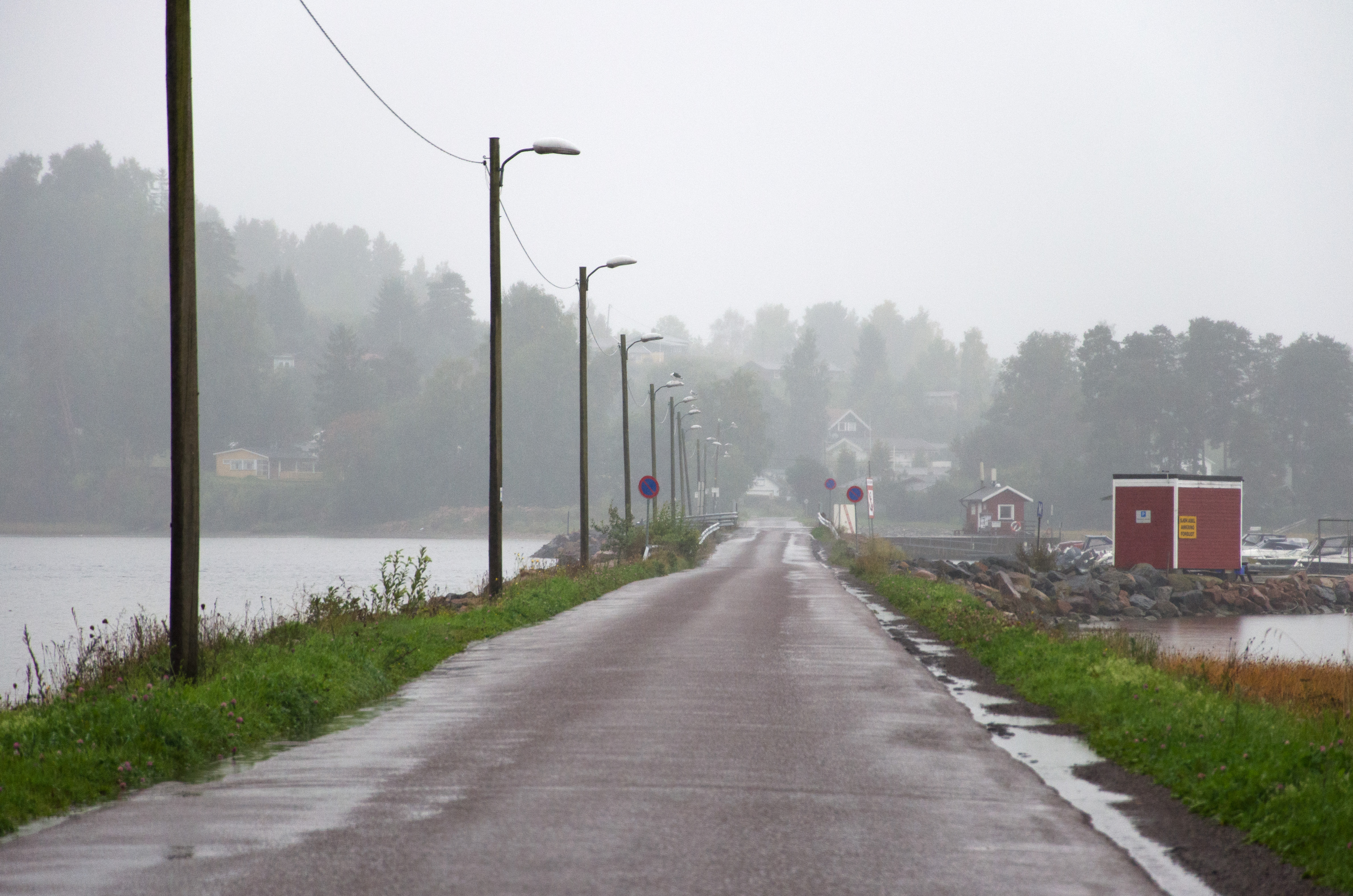 Bjerkøyveien over til Bjerkøya i Sande i Vestfold